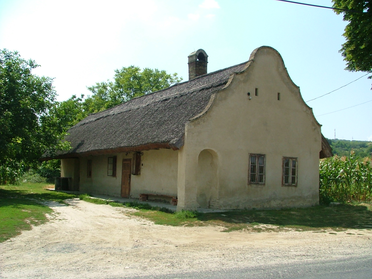 Parasztbarokk lakóház (Nyúl, Magyarország)